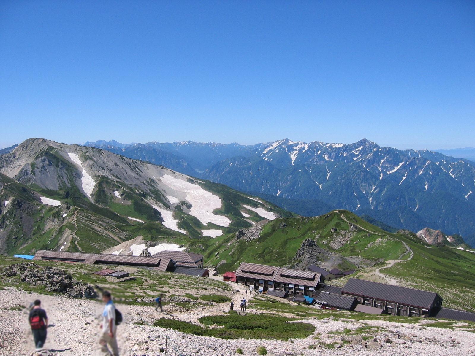 白馬岳直下の白馬山荘と北アルプスの山々